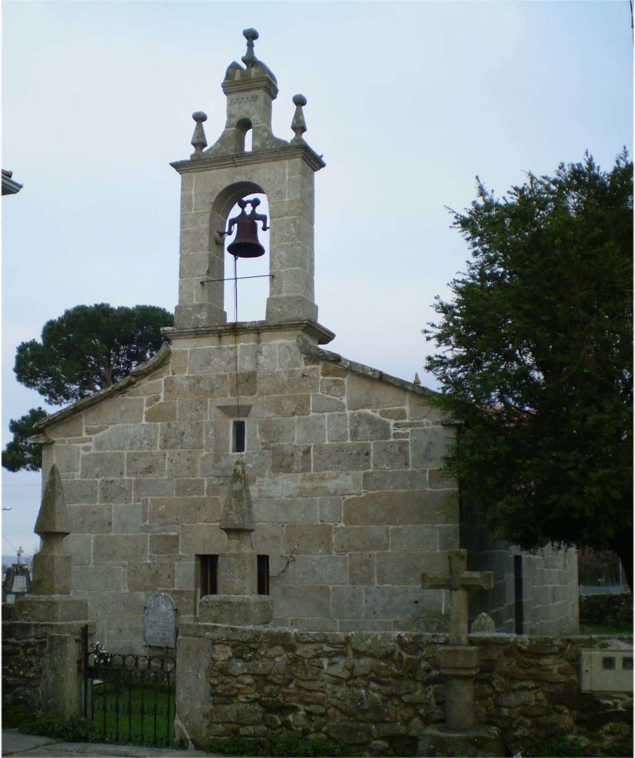 Igrexa de Santiago de Reboredo (Antas de Ulla)